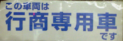 行商専用車のステッカー